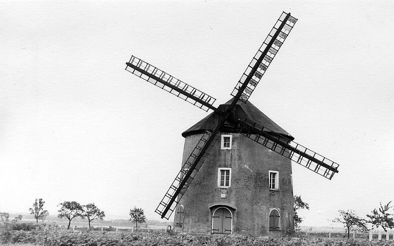 Original image description from the Deutsche FotothekNiederau-Großdobritz. Turmholländermühle